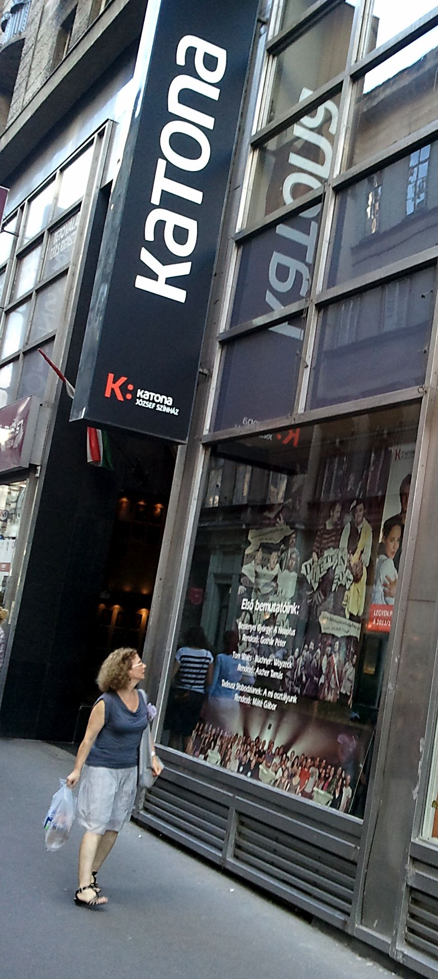 Katona József Színház 2011 szeptember új cégér. Budapest V. kerület, Petőfi Sándor utca.